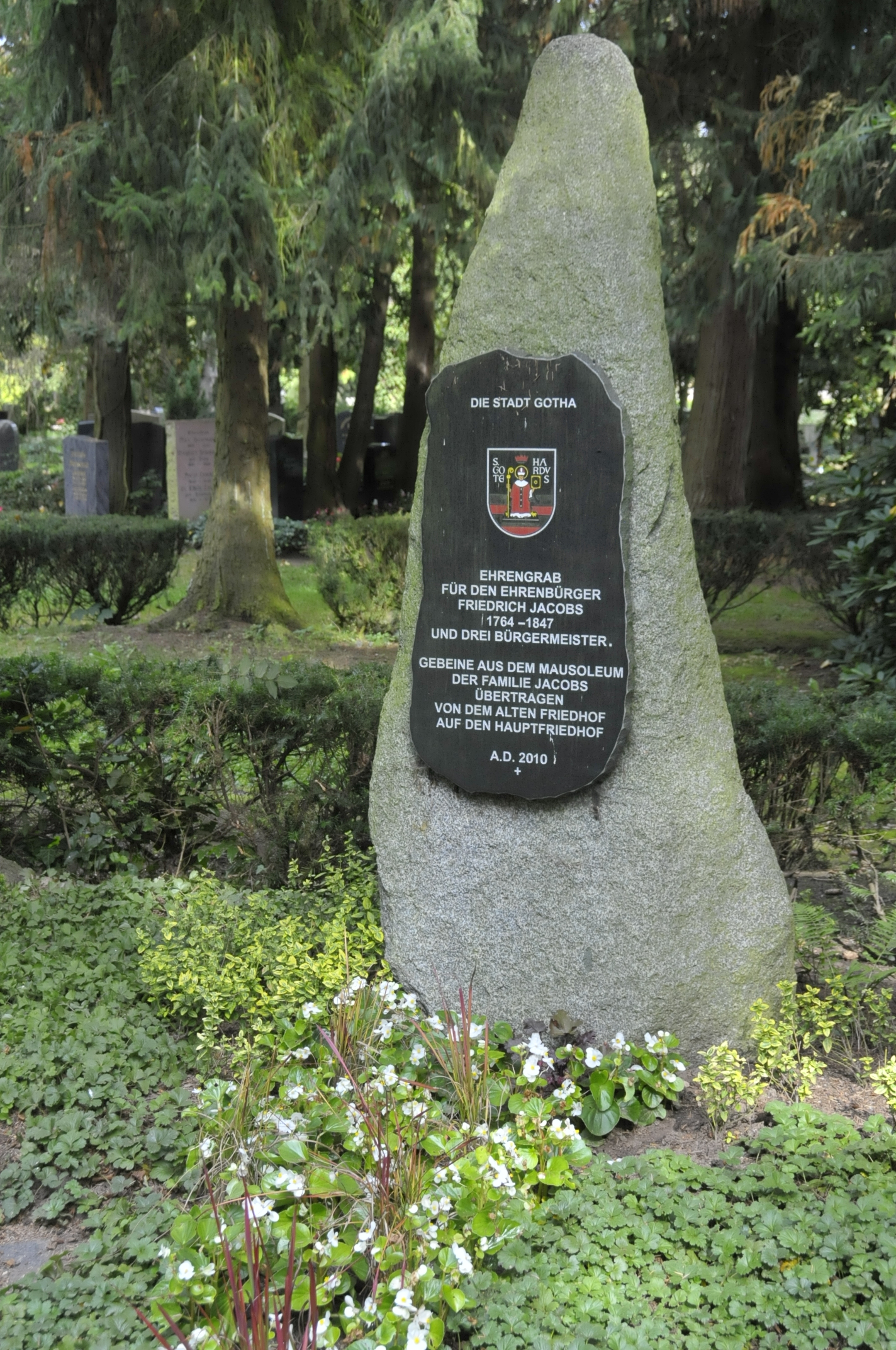 Ehrengrab des Friedrich Jacobs auf dem Hauptfriedhof Gotha